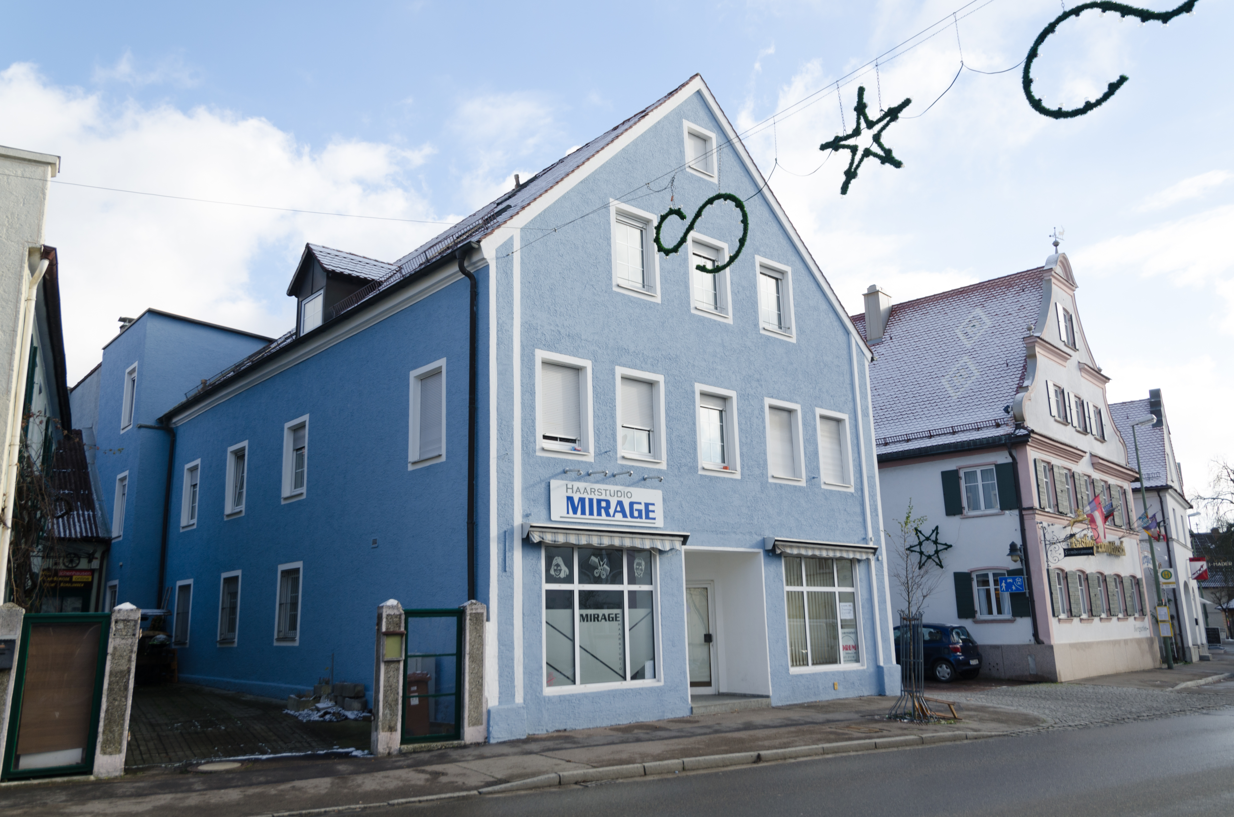 Ichenhausen, Ensemble, Marktstraße 25